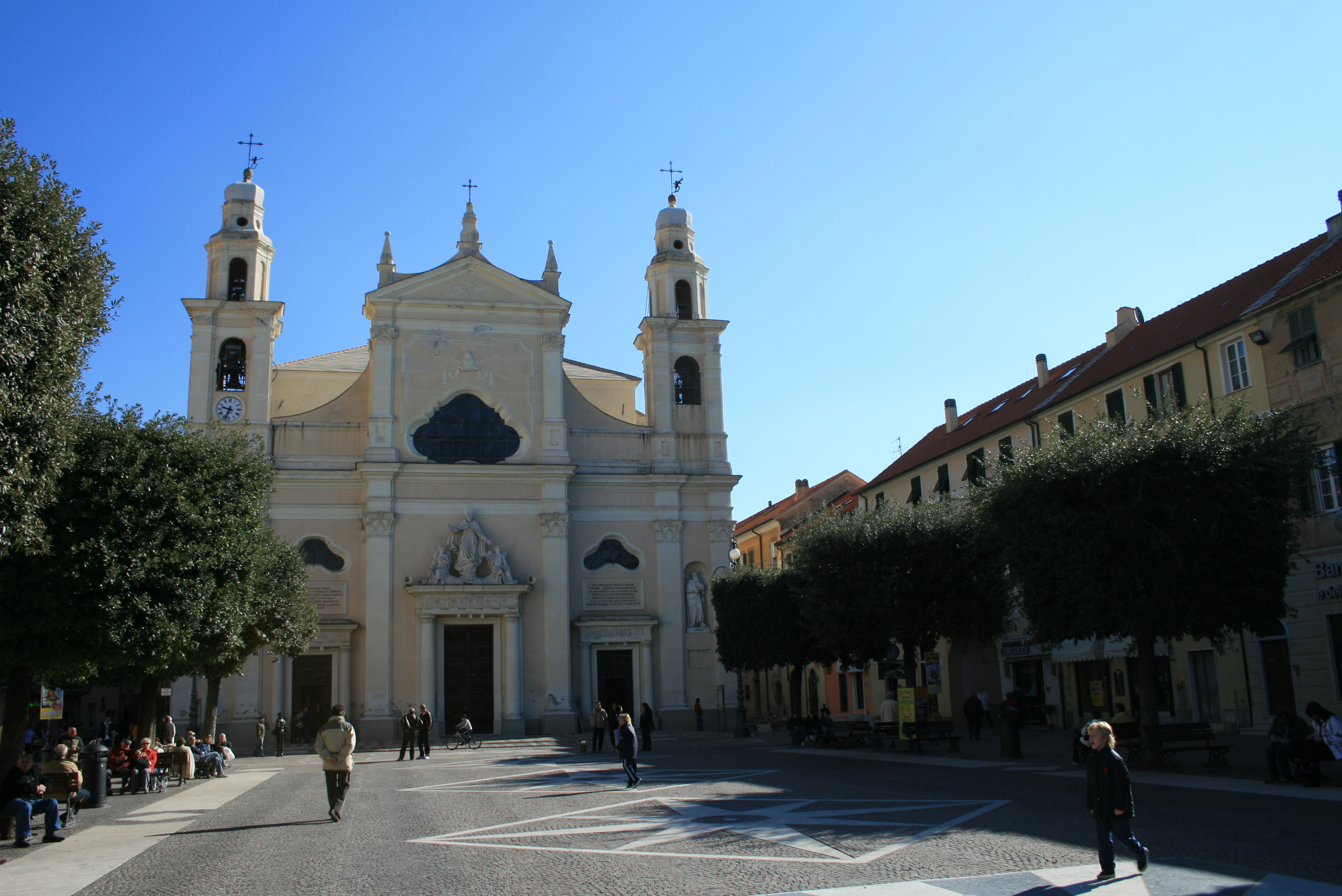 Pietra Ligure San Nicolò Church